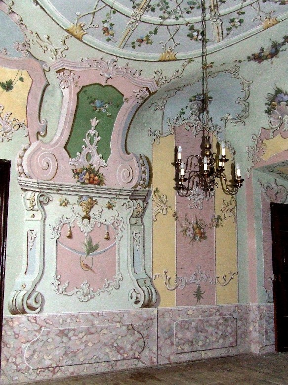 L`Huillier-Coburg-kastély, belső falfestmény, Edelény Saját kép. . Egresi János 2006. szeptember 23., 10:37 (CEST)